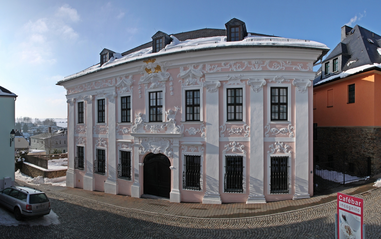 Schneeberg (Erzgebirge): Blick auf das Bortenreuther-Haus. Das Haus zählt zu den wertvollsten barocken Wohnbauten der Stadt. Es wurde 1724/25 im Auftrag des Kaufmanns Johann Friedrich Bortenreuther erbaut. Es beherbergt heute das Museum für bergmännische Volkskunst.